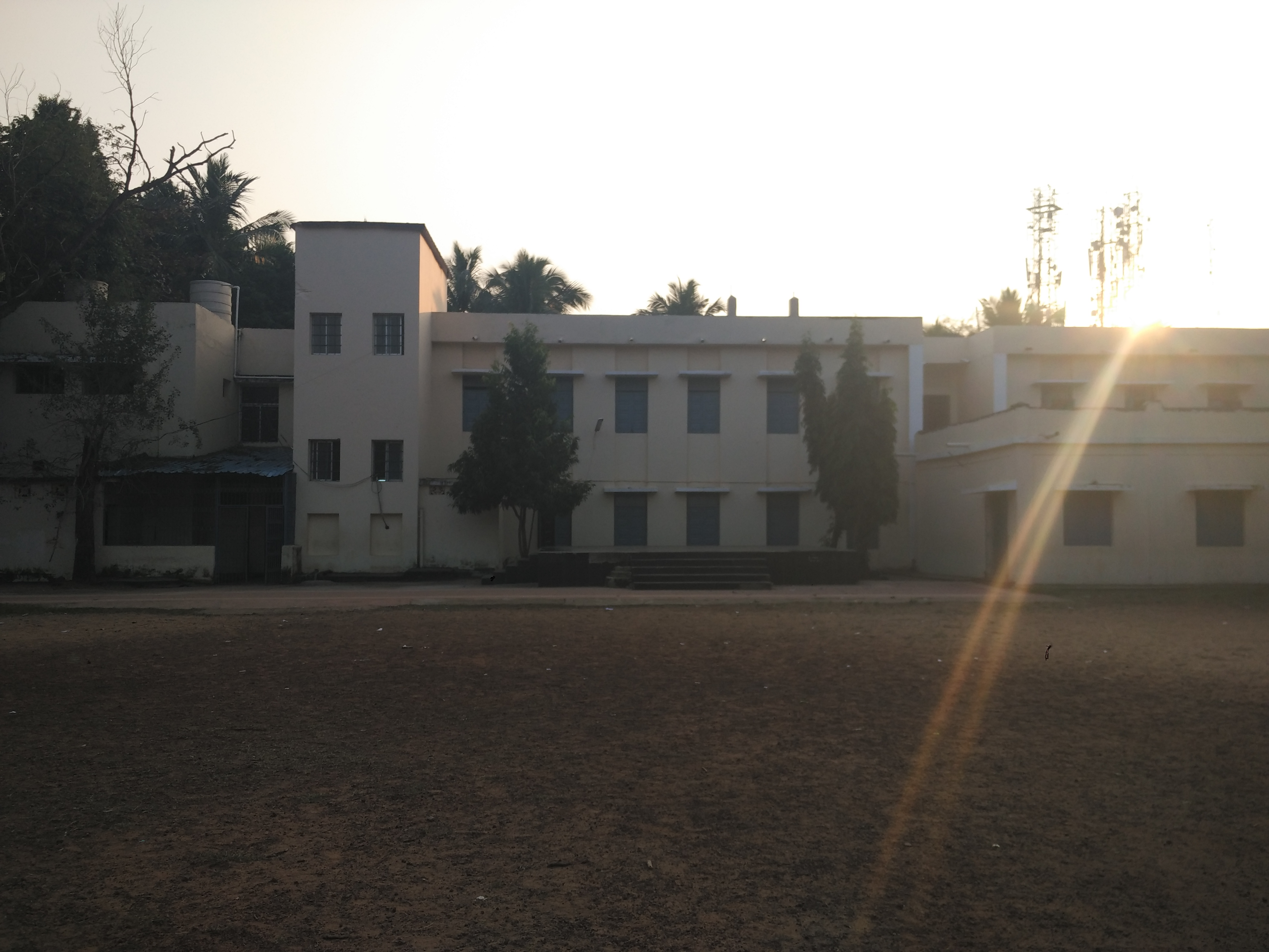 ଓଡ଼ିଆ: ସହିଦ ନଗର ସରକାରୀ ଉଚ୍ଚ ବିଦ୍ୟାଳୟ, ଭୁବନେଶ୍ୱର